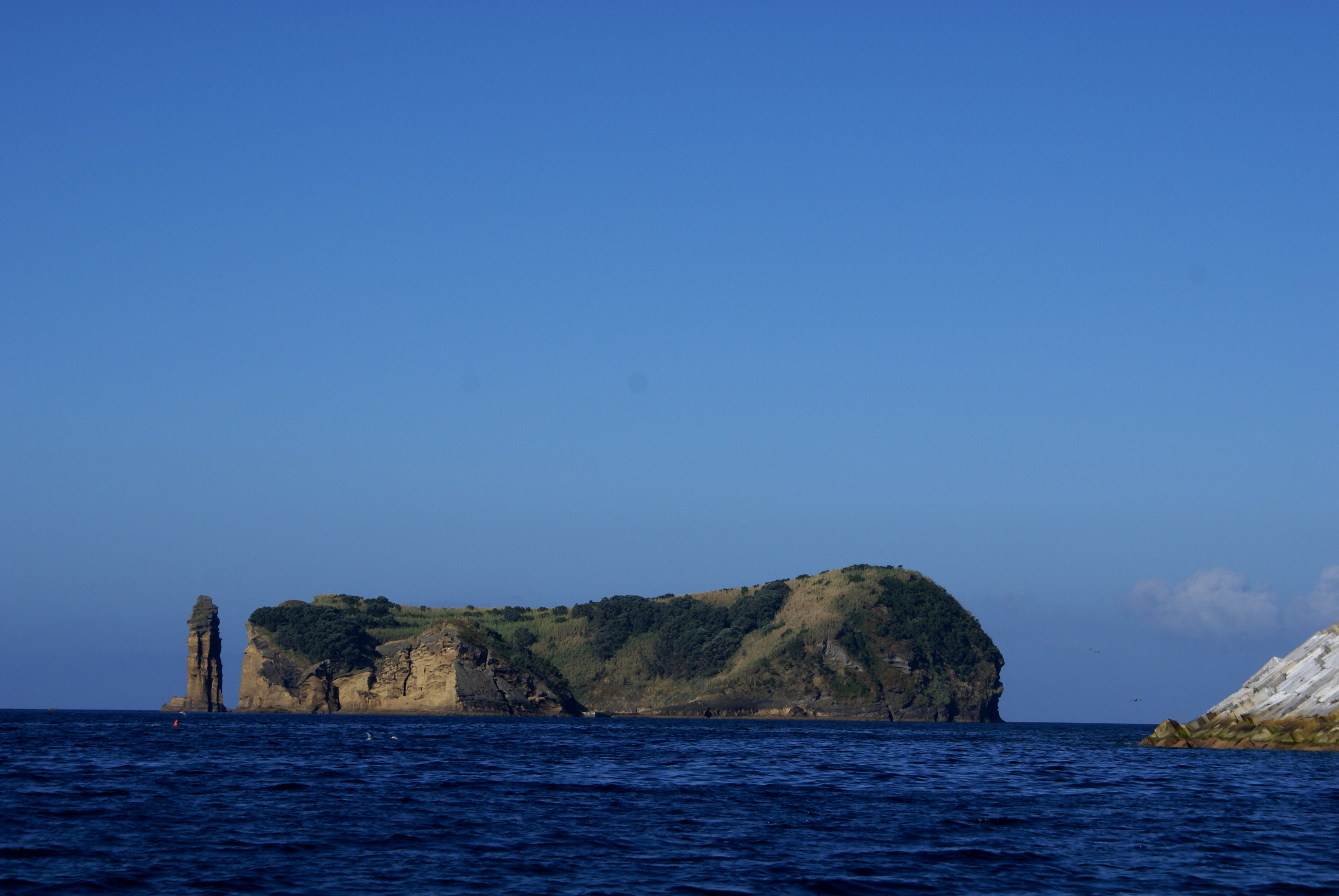 Ilhéu de vila Franca do Campo, vista geral, Vila Franca do Campo. ilha de São Miguel, Açores